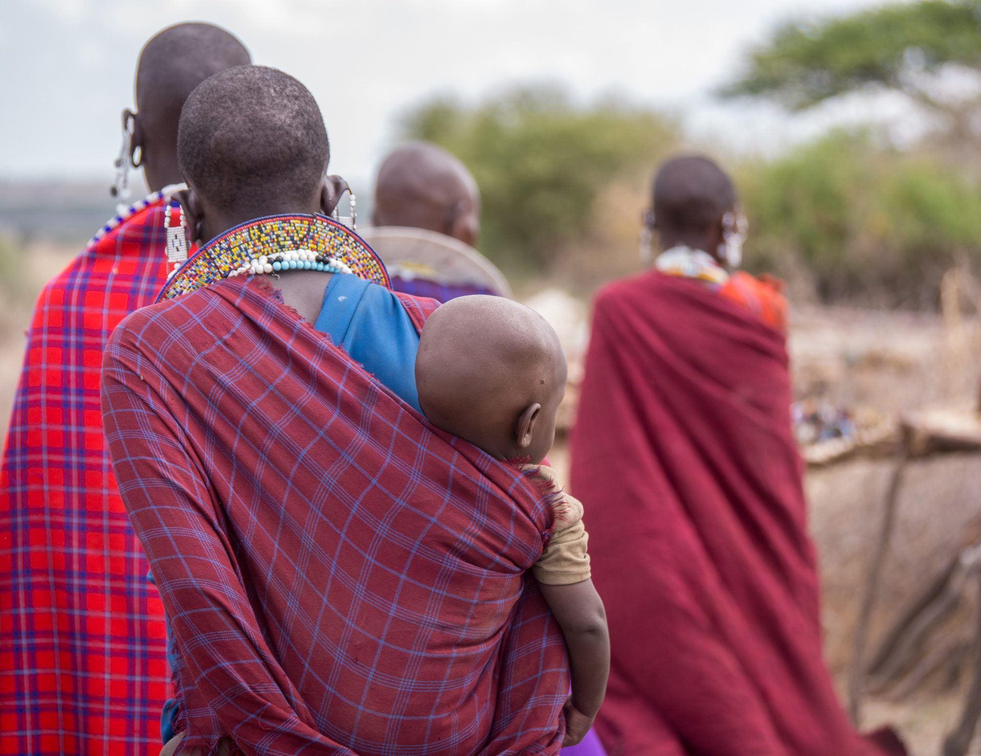 Massai Boma, Tanzania